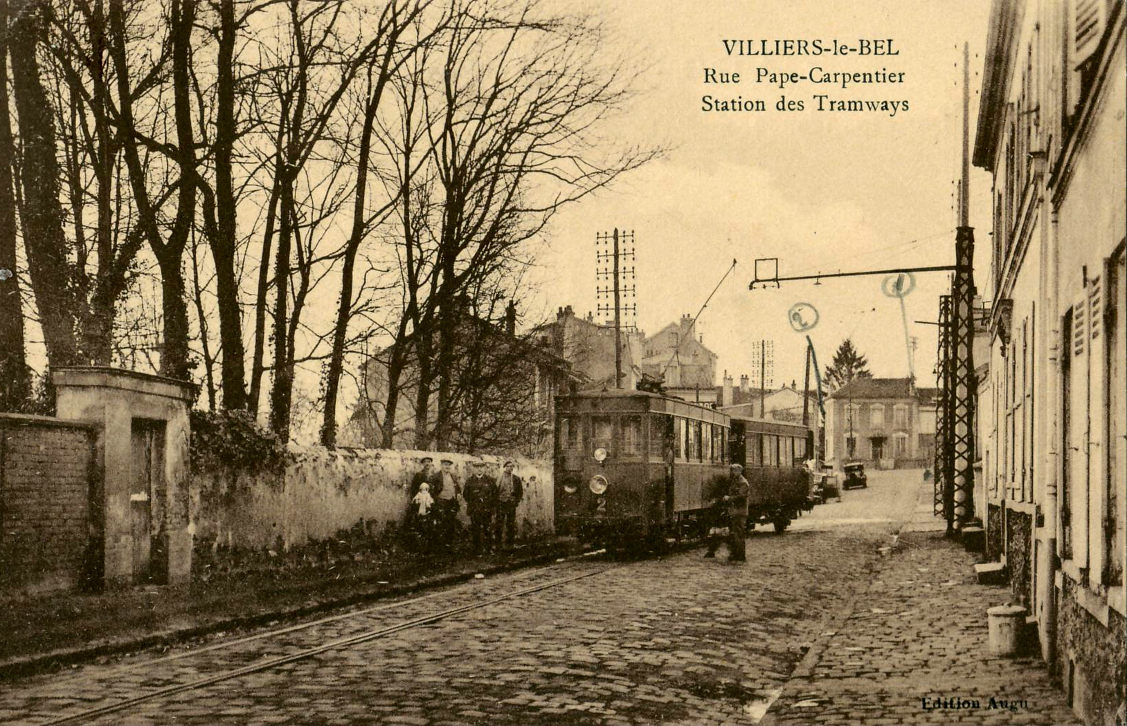 Carte postale ancienne éditée par Augu: VILLIERS-LE-BEL - Rue Pape Carpentier : La station des tramways